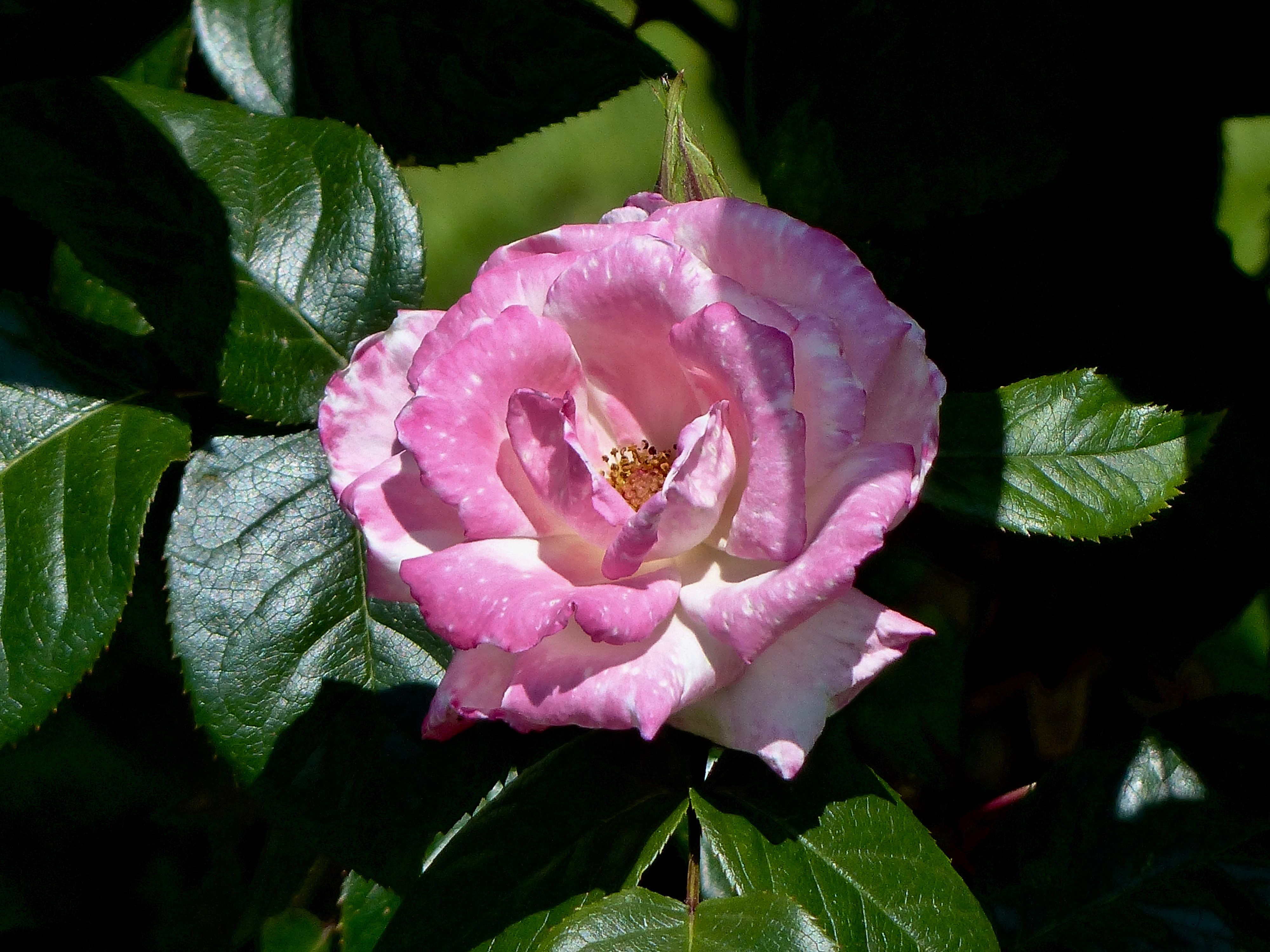 Rosengarten der Stadt Köln: Rosa 'Händel'